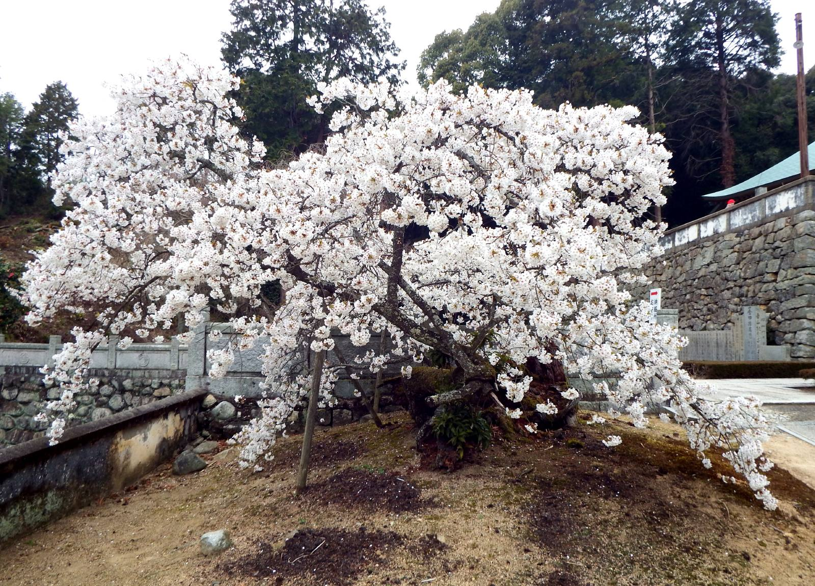 満願寺のマンガンジ桜